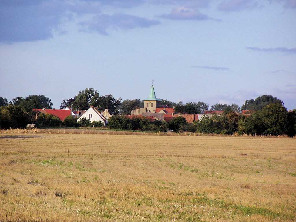 Stary Dwór - gm. Trzciel - woj. lubuskie - Poland